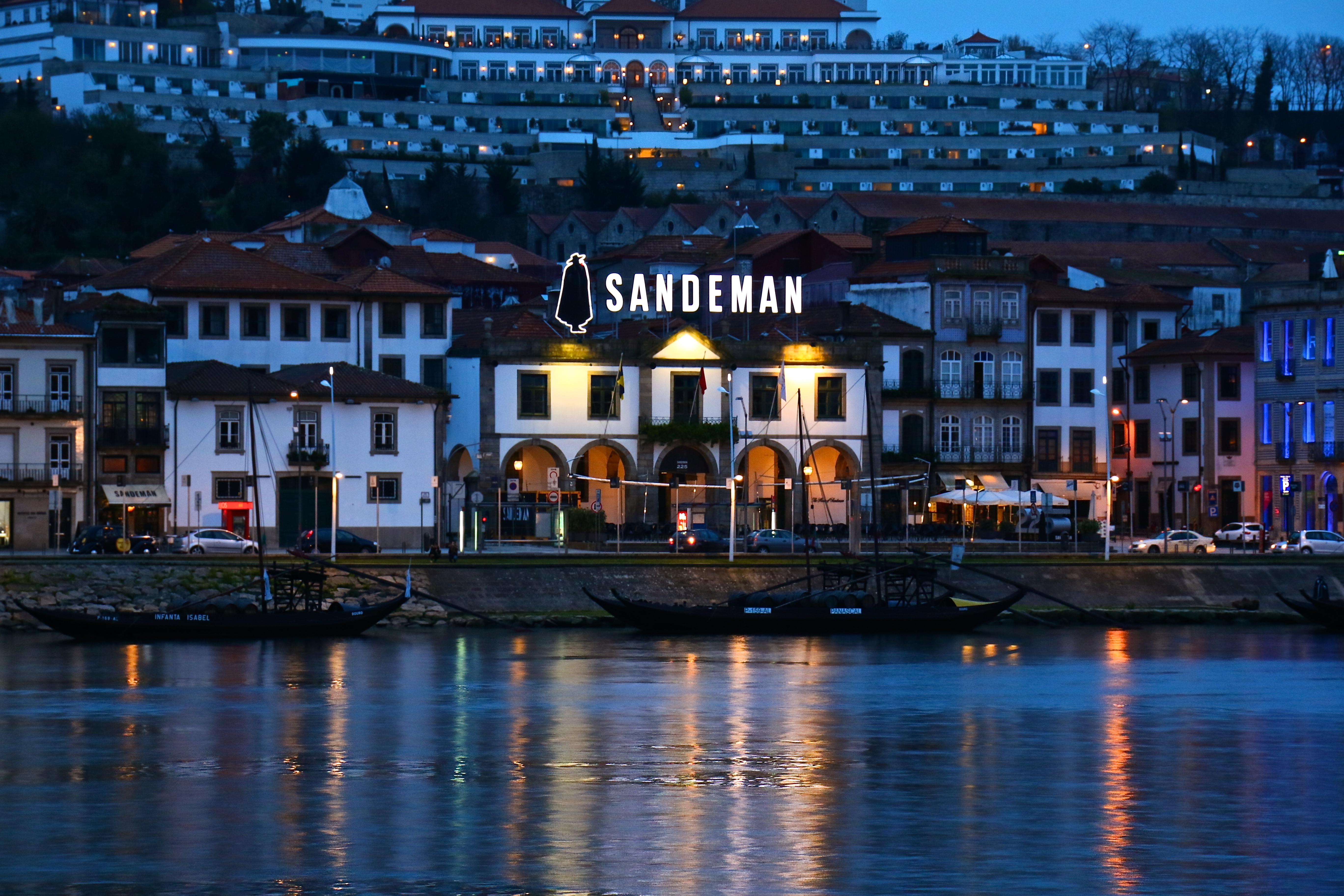 Porto la nuit